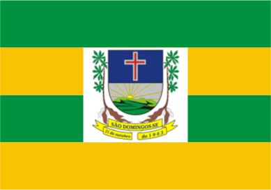 Bandeira do município de São Domingos-Sergipe, Brasil